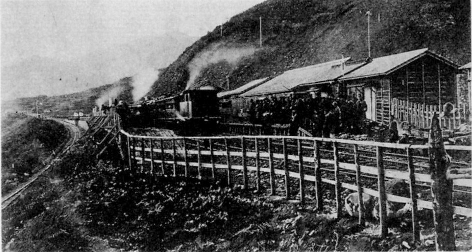 1900年（明治33年）11月1日、姨捨駅の開業風景。スイッチバックが良く分かる。「JR東日本篠ノ井駅提供」とある。『信州の昭和史 長野県近代百年の記録』(1982年、毎日新聞社)にも掲載。